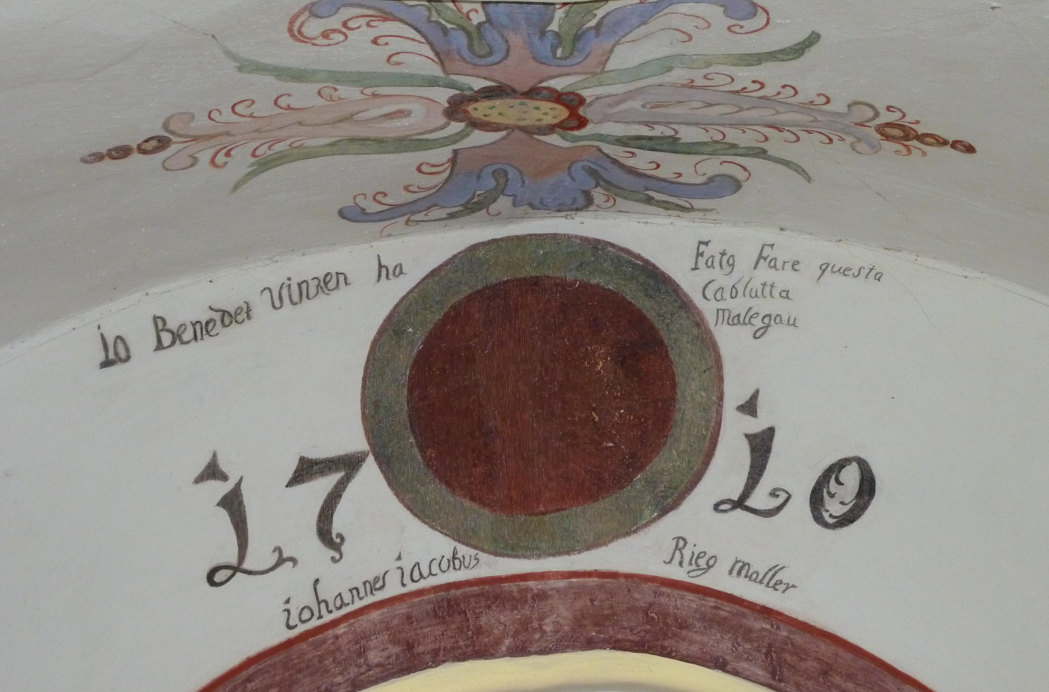 Caplutta Sontga Clau Inschrift des Stifters